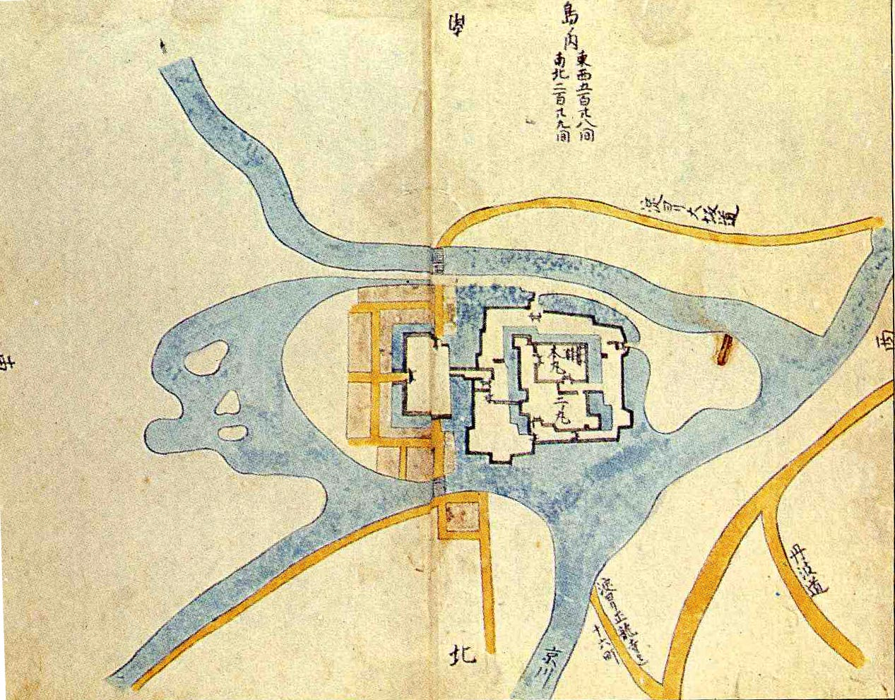 淀城